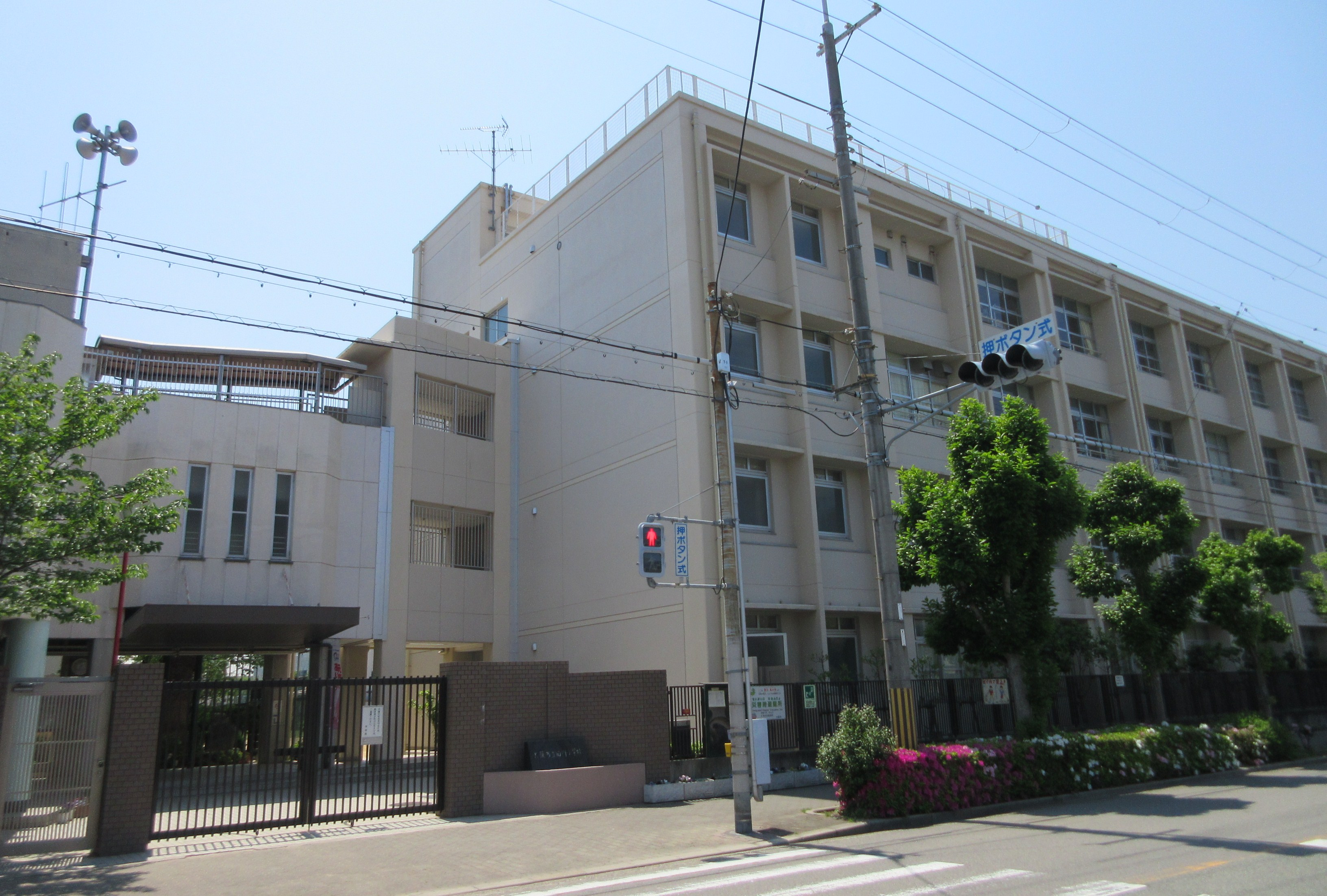 大阪市立田川小学校